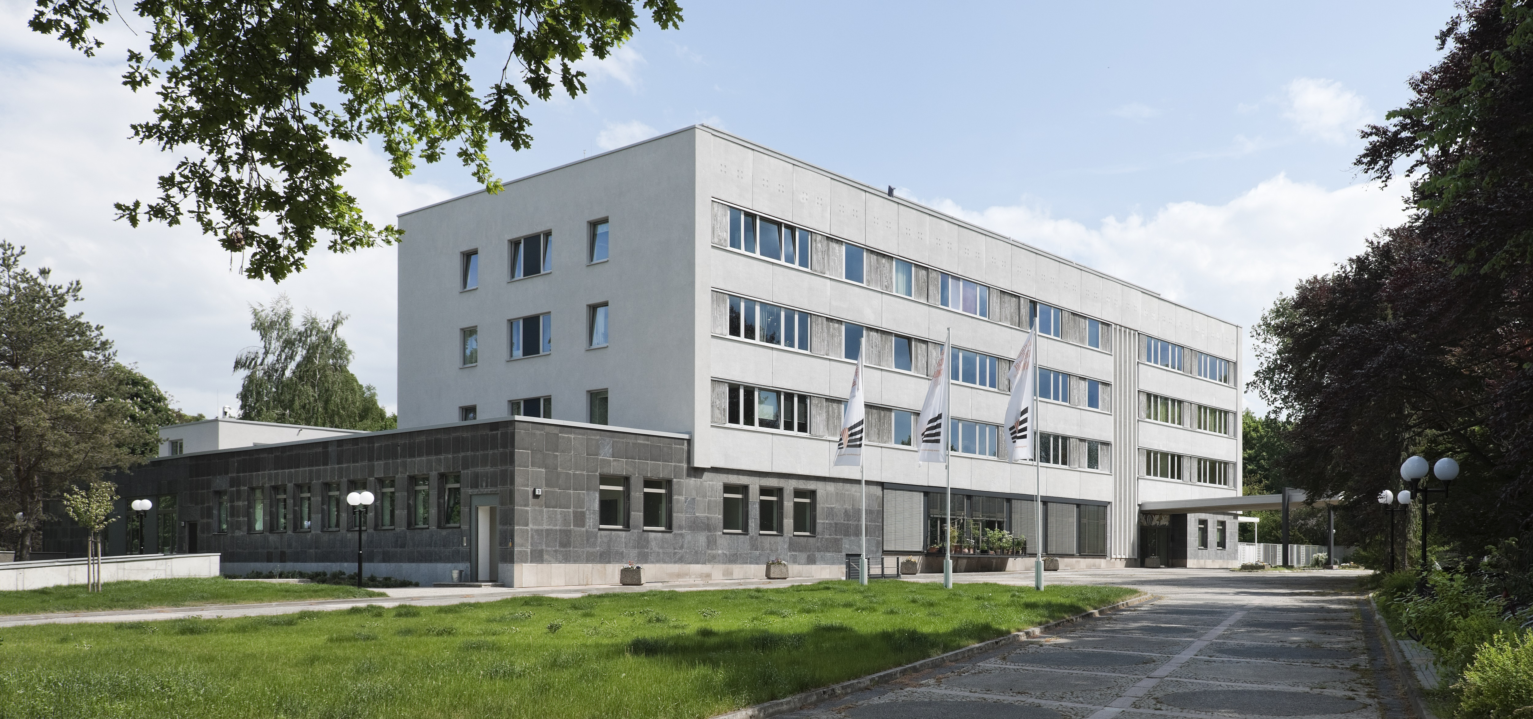 Berlin-Niederschönhausen, Tschaikowskistraße 1, Appartementhaus im Schlosspark Schönhausen. Ansicht gegen Süden.